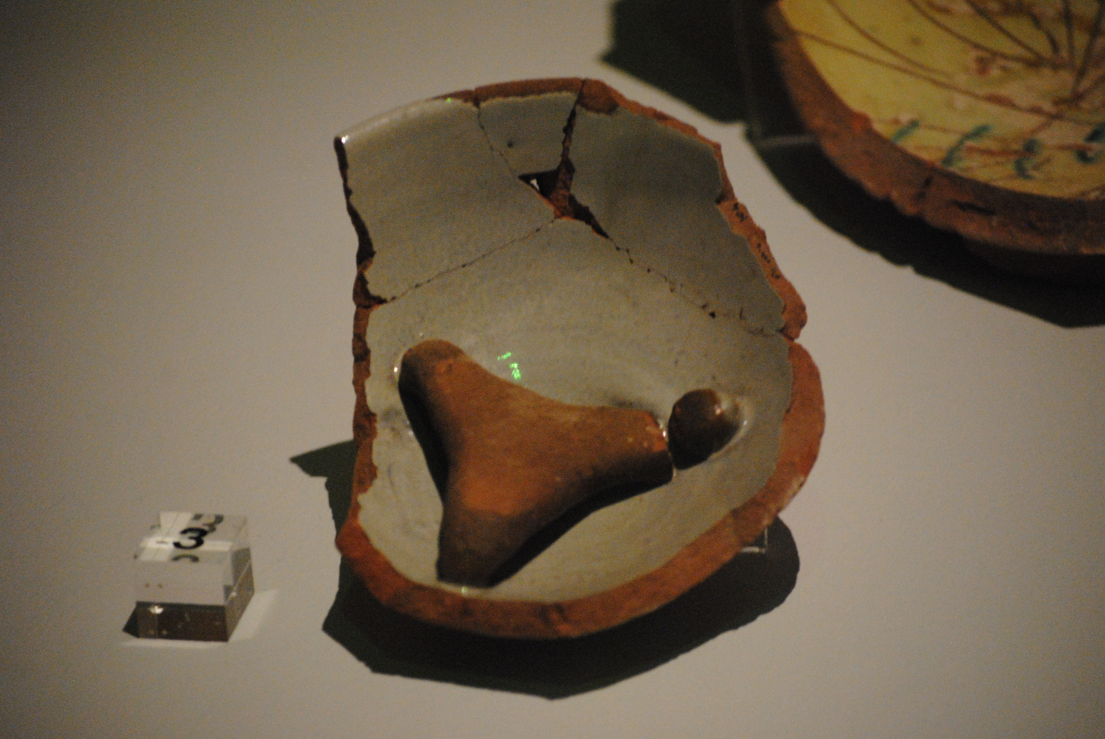 Ciotola in maiolica arcaica (smaltata) prodotta a Pisa, scarto di seconda cottura databile tra il 1530 e il 1560 (recuperata da villa Quercioli, Pisa)- si nota ancora il distanziatore rimasto attaccato al pezzo - Museo nazionale di San Matteo.